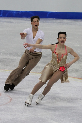 Адрианн Пулин и Марк-Андре Сервант (Канада) на чемпионате мира по фигурному катанию среди юниоров 2012